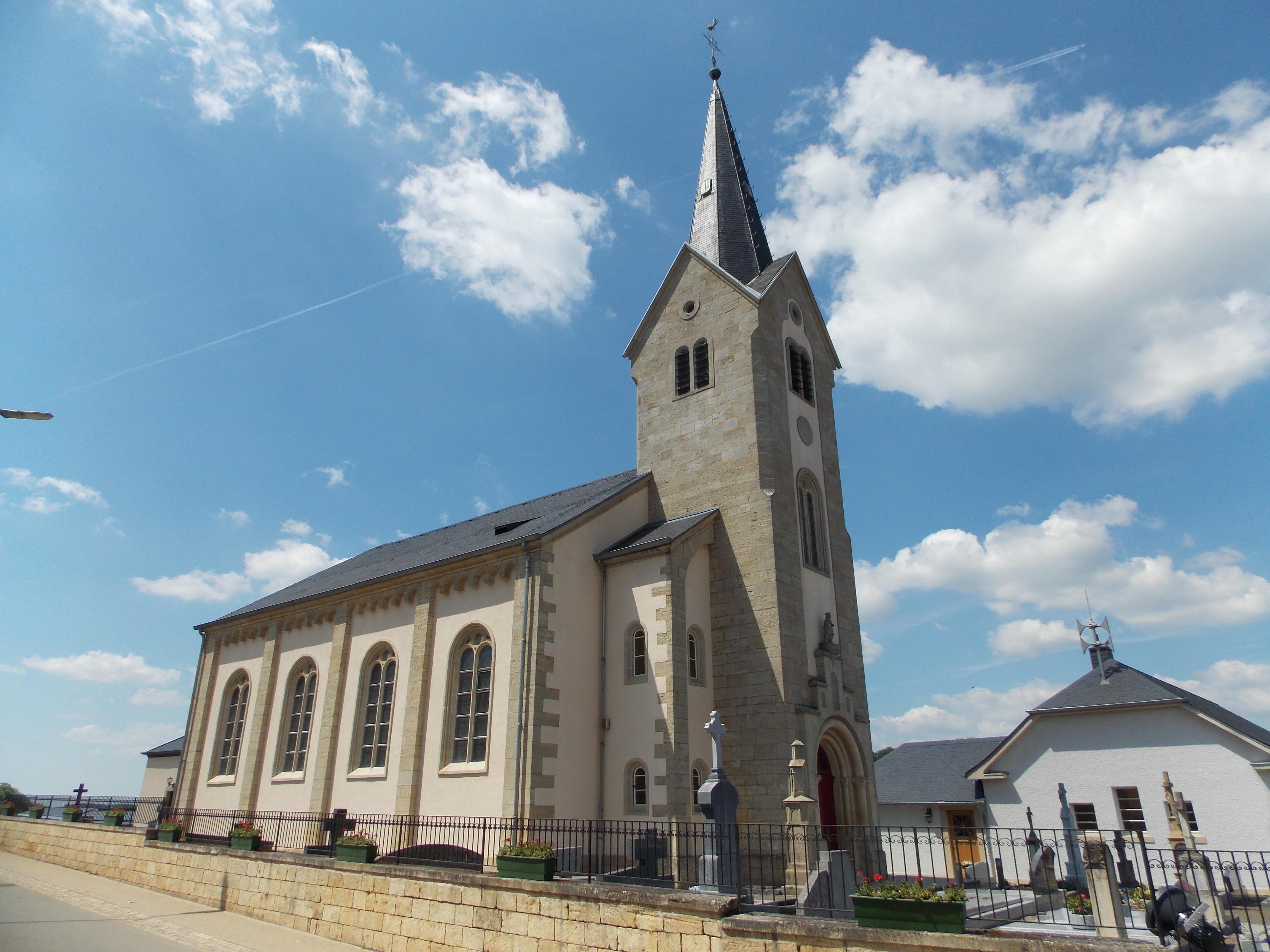 St.-Mathias Kirche in Fingig, vom Südosten aus gesehen